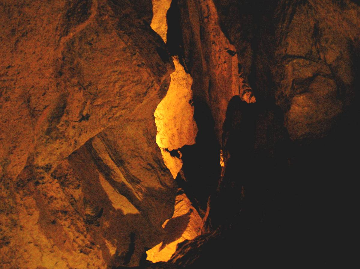 eine der zahlreichen Klüfte in der Goetzhöhle Meiningen